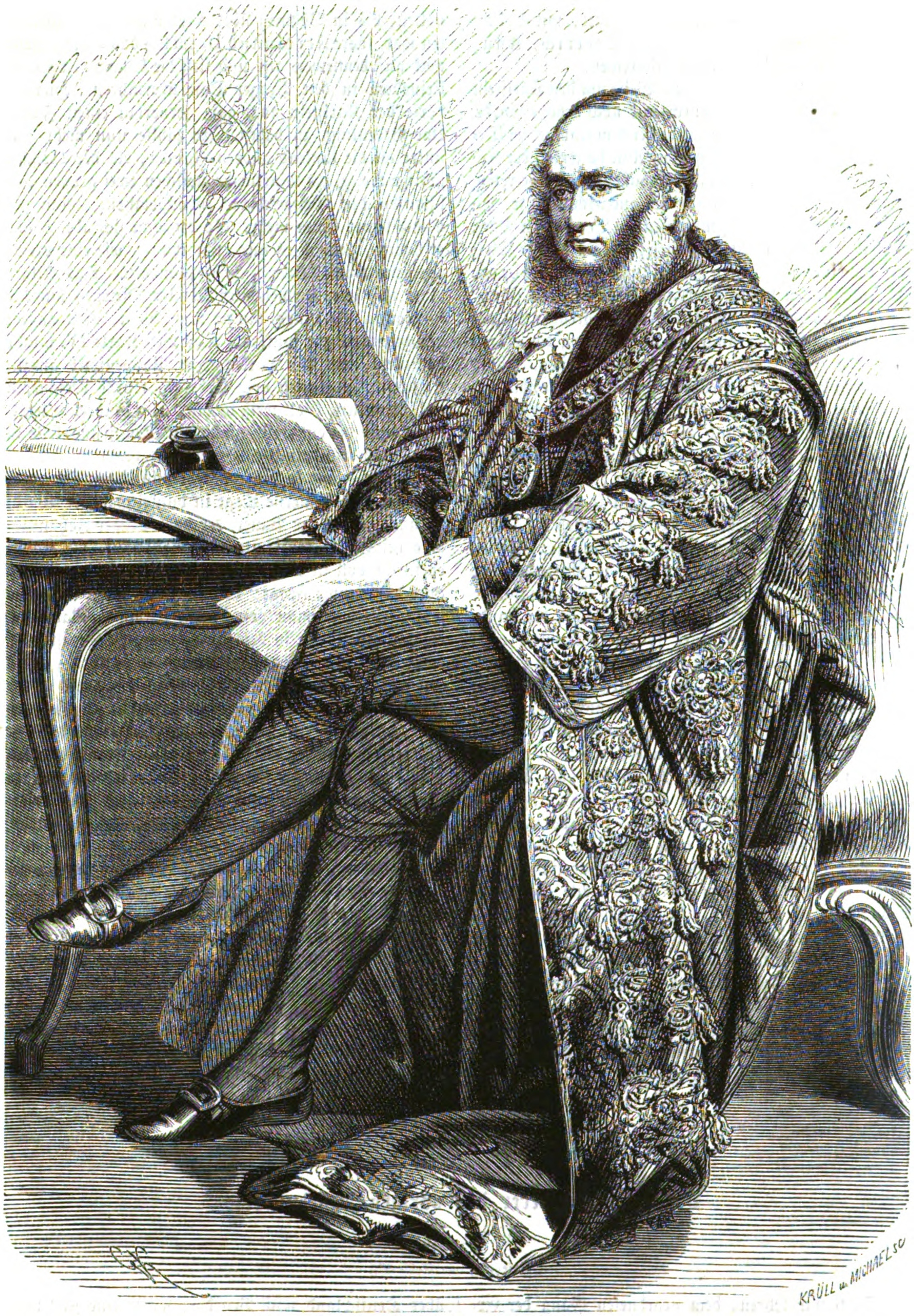 Benjamin Samuel Philipps, englischer Unternehmer, Vorkämpfer der Judenemanzipation und Lordmayor von London.